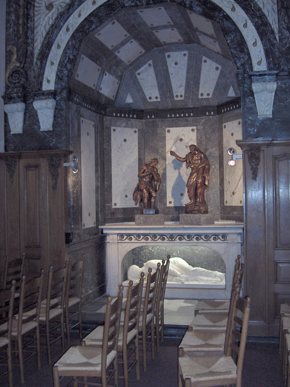 side chapel (1778); Onze-Lieve-Vrouw-ter-Duinenkerk; Ostend, Belgium